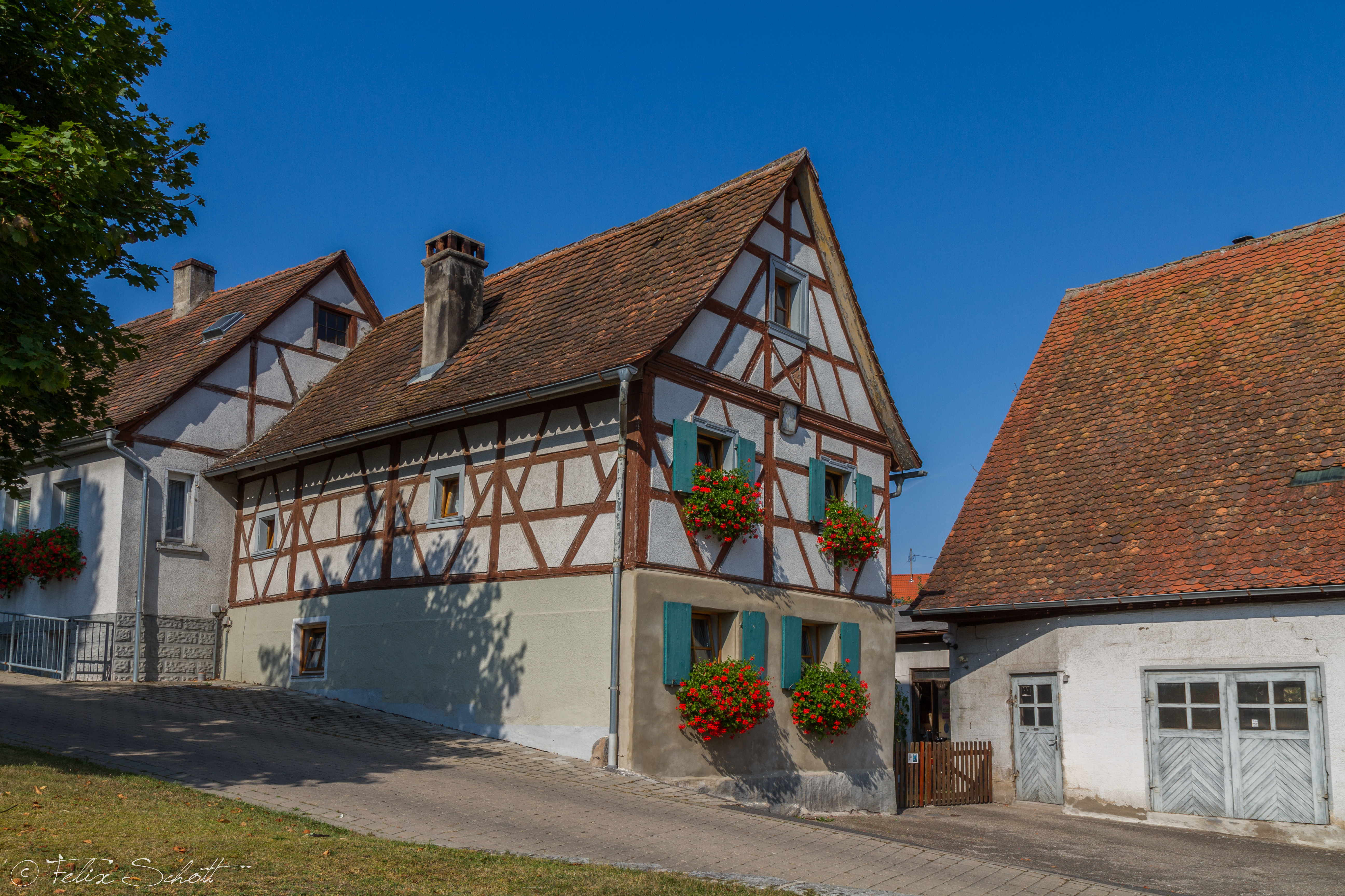 Bauernhaus, zweigeschossiger Satteldachbau, Erdgeschoss massiv verputzt, Obergeschoss in Fachwerk, 1717.This is a photograph of an architectural monument.